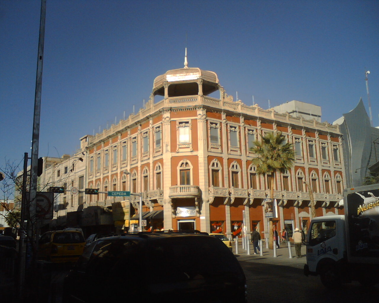 Construido en 1920, es considerado patrimonio arquitectónico de Torreón